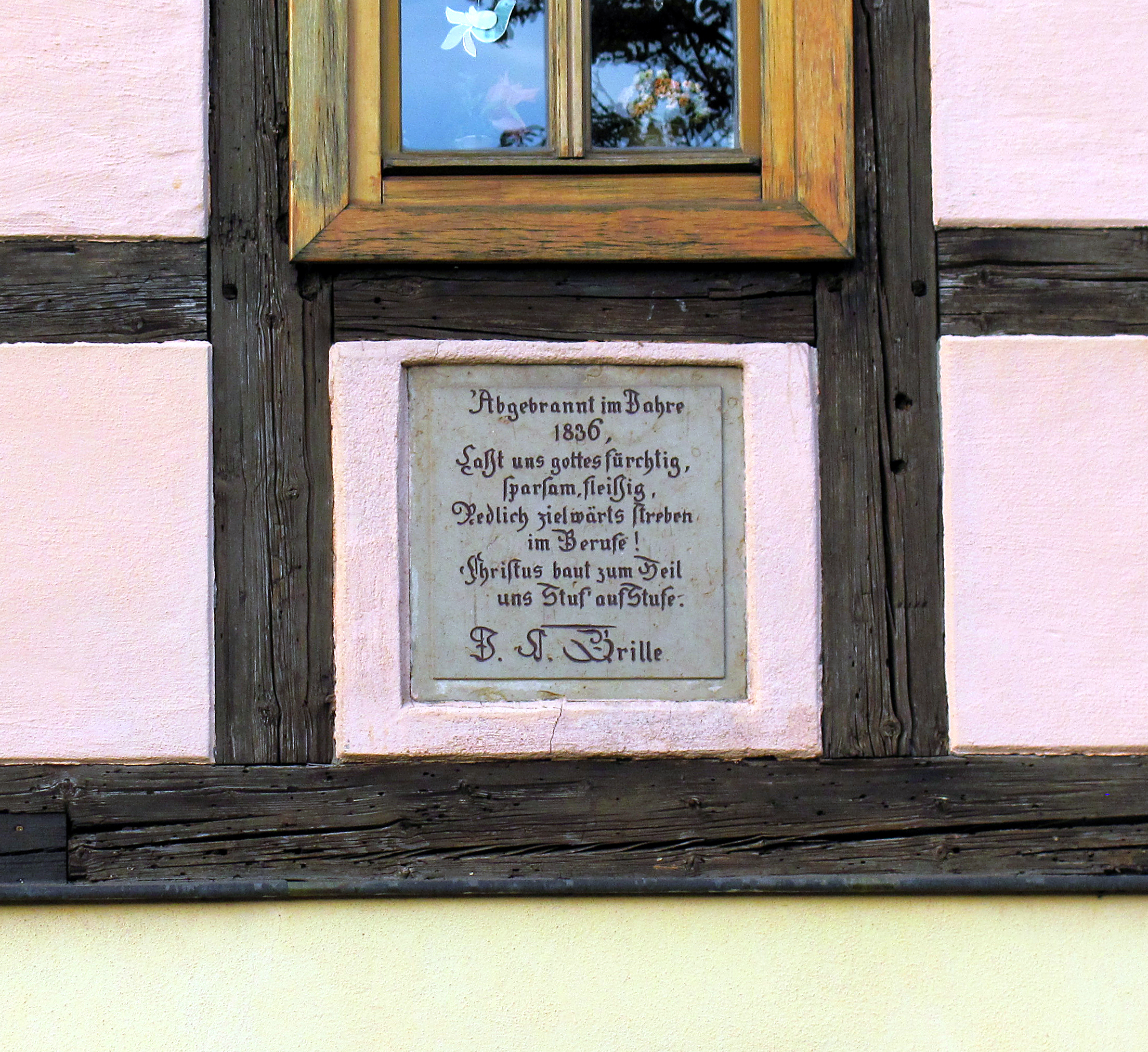 Radebeul, Dreiseithof Altzitzschewig 8: Inschrifttafel von 1836